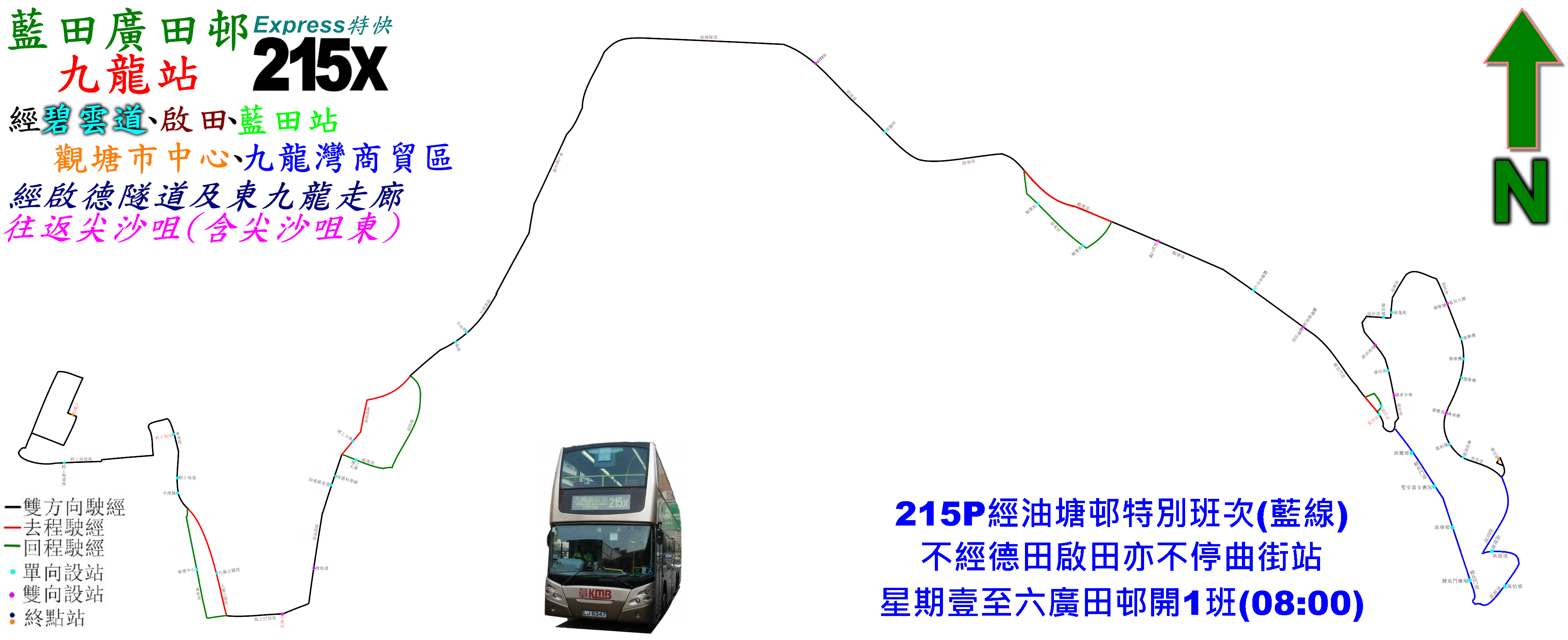 中文（香港）: 九巴215X線的走線圖